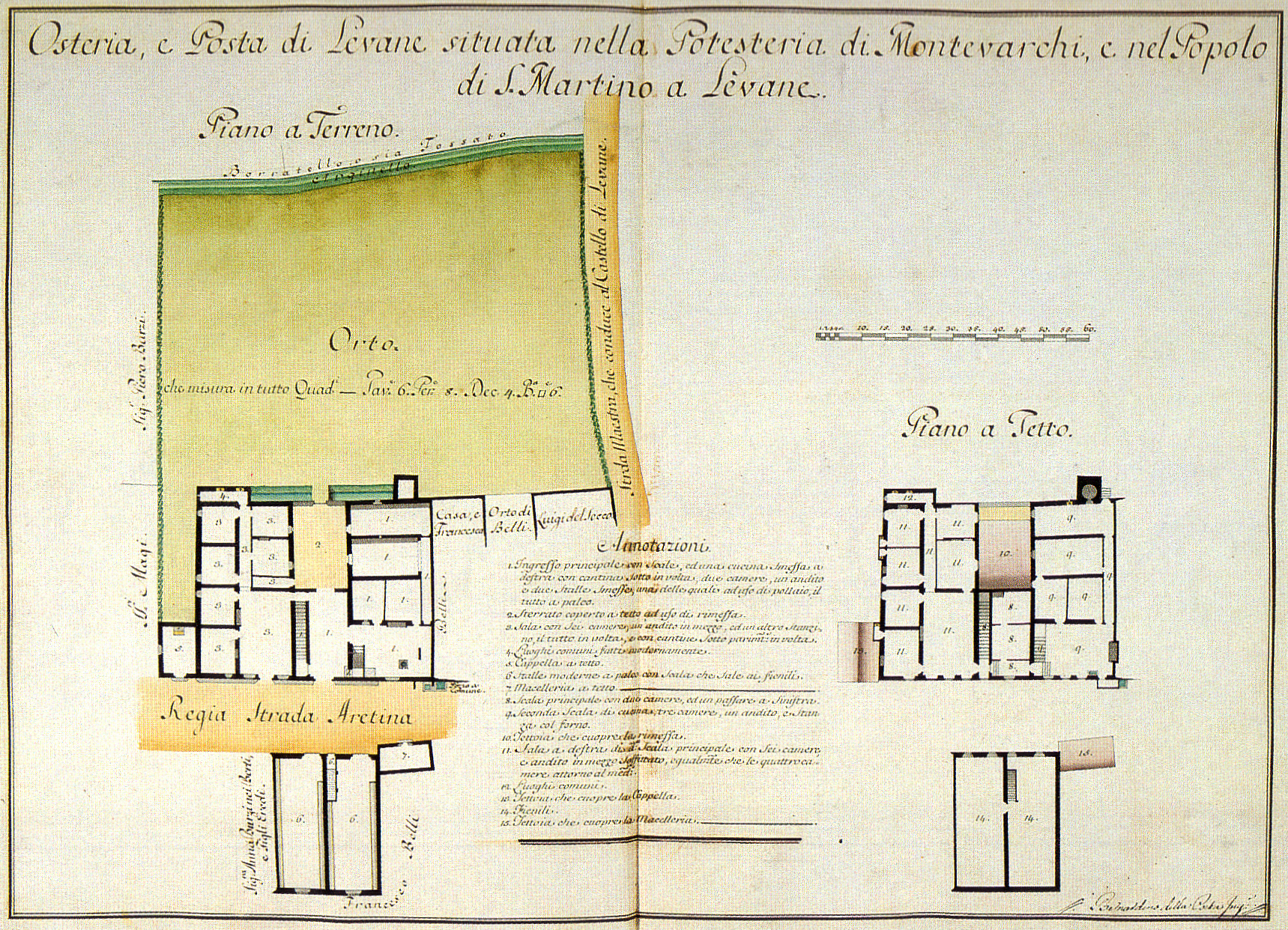 Levane's Inn